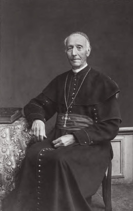 Étienne-Barthélémy Bagnoud CRA (* 1. Januar 1803 in Icogne; † 2. November 1888 in Saint-Maurice) war ein Schweizer römisch-katholischer Geistlicher und Abtbischof der Territorialabtei Saint-Maurice.